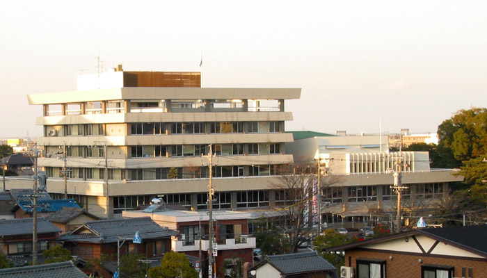 Matsusaka city hall 松阪市役所 三重県松阪市殿町で撮影